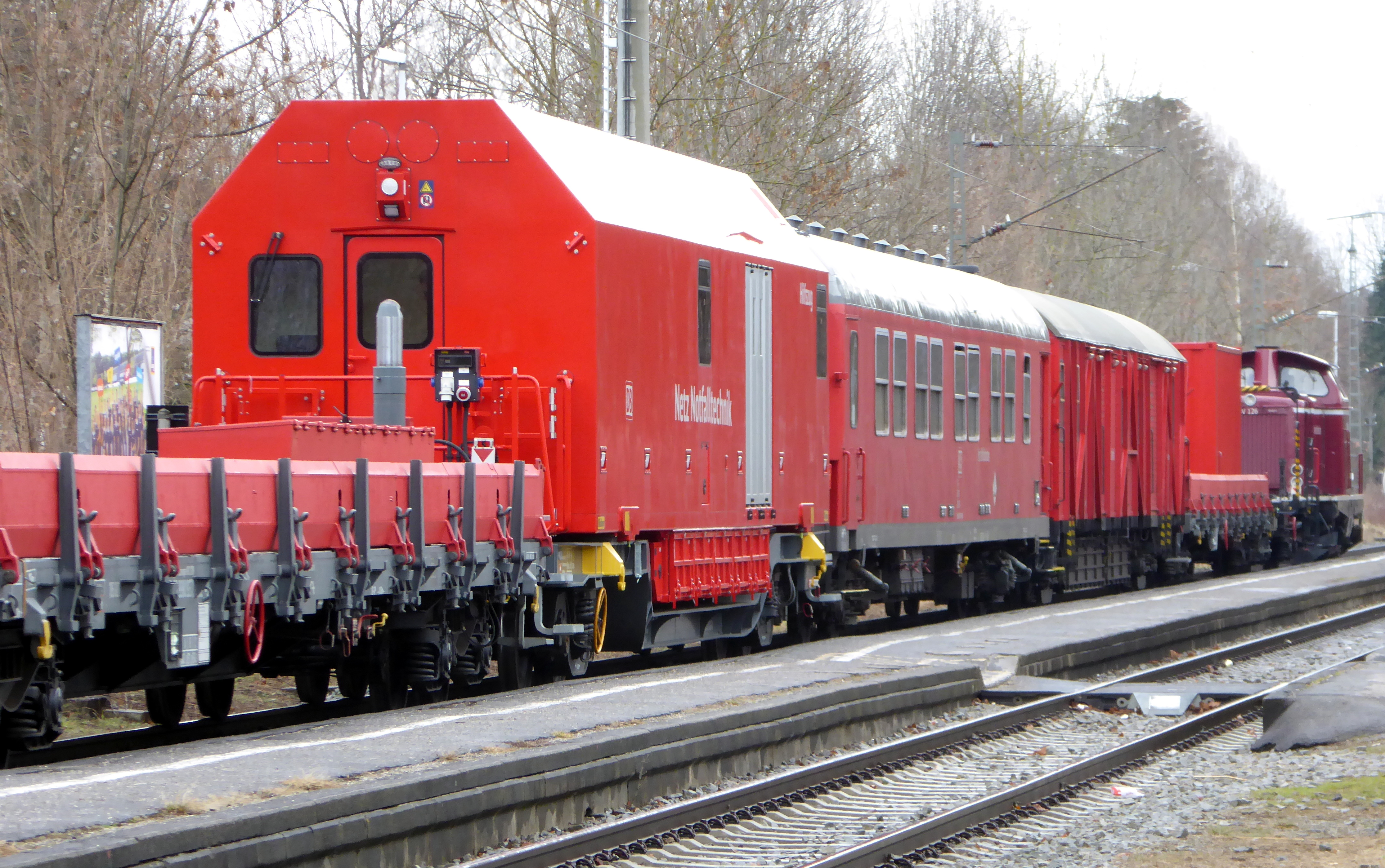 Bahnhof Kolbermoor, Hilfszug der DB Netz Notfalltechnik. Von außerhalb des Bahnhofs aufgenommen.